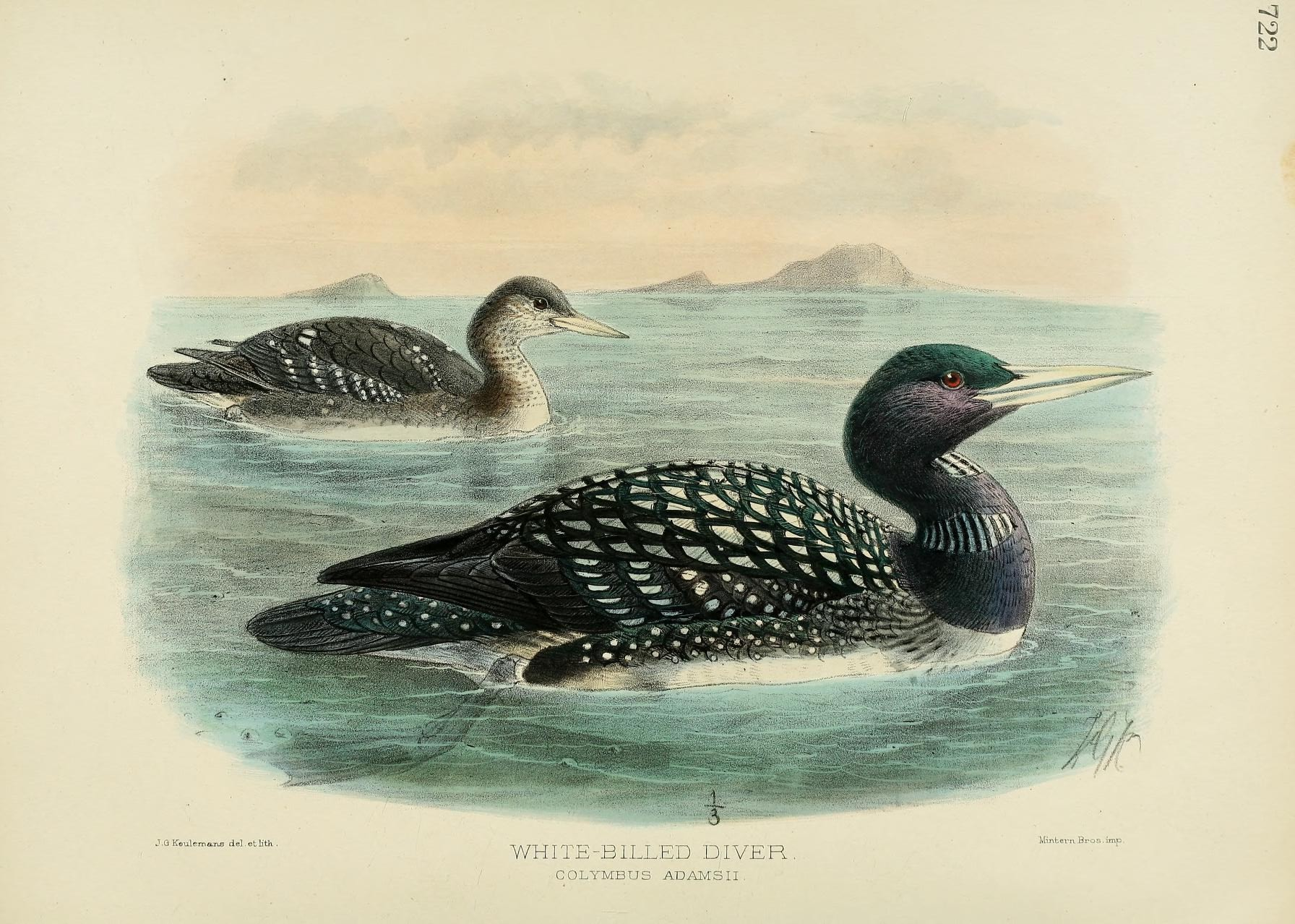 £ p . hH 1 — 1 l-H p w p p p .! T i— 1 en i— 1 P i — i cq P § i !* P p r . o H o X i i